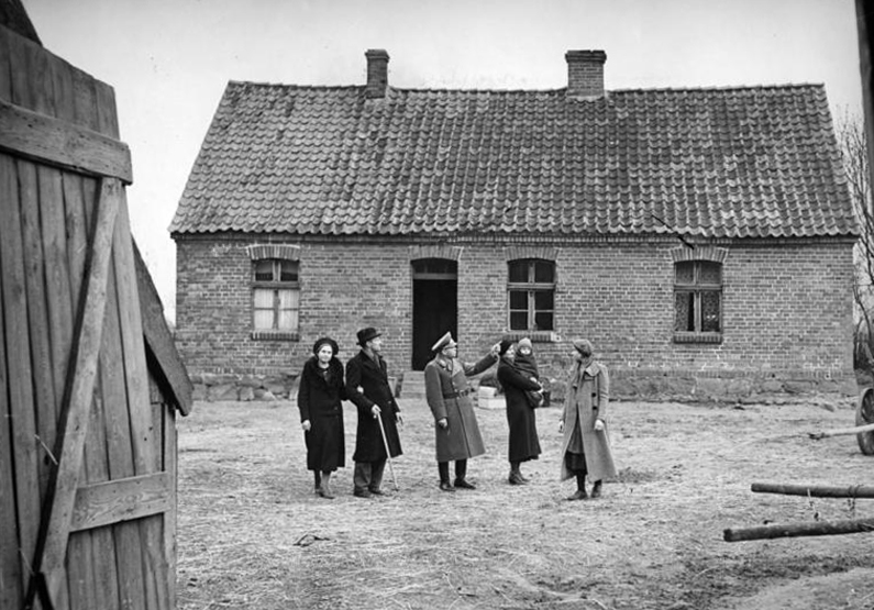 Ankunft baltendeutscher Umsiedler Sie haben eine neue Heimat gefunden U.B.z.: der Kreisbauernführer zeigt den Baltendeutschen Siedlern ihren neuen Besitz. They have found a new homeland U.B.z.: the local farms manager shows the Baltic-German settlers their new property.